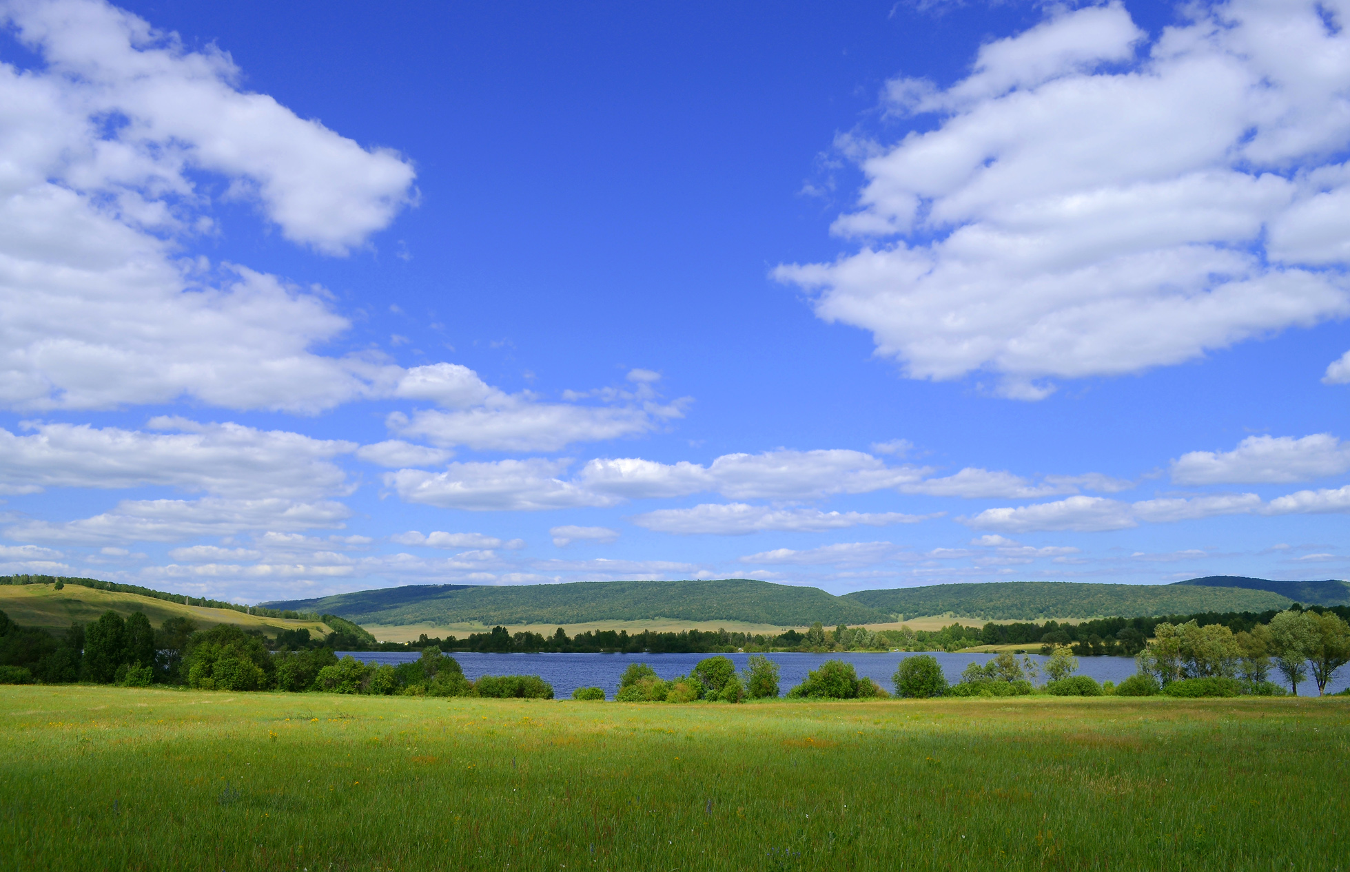 Pond in Urazbayevo, Ishimbai rayon (Уразбаево (Ишимбайский район)), river Bazyelga (Базъелга))